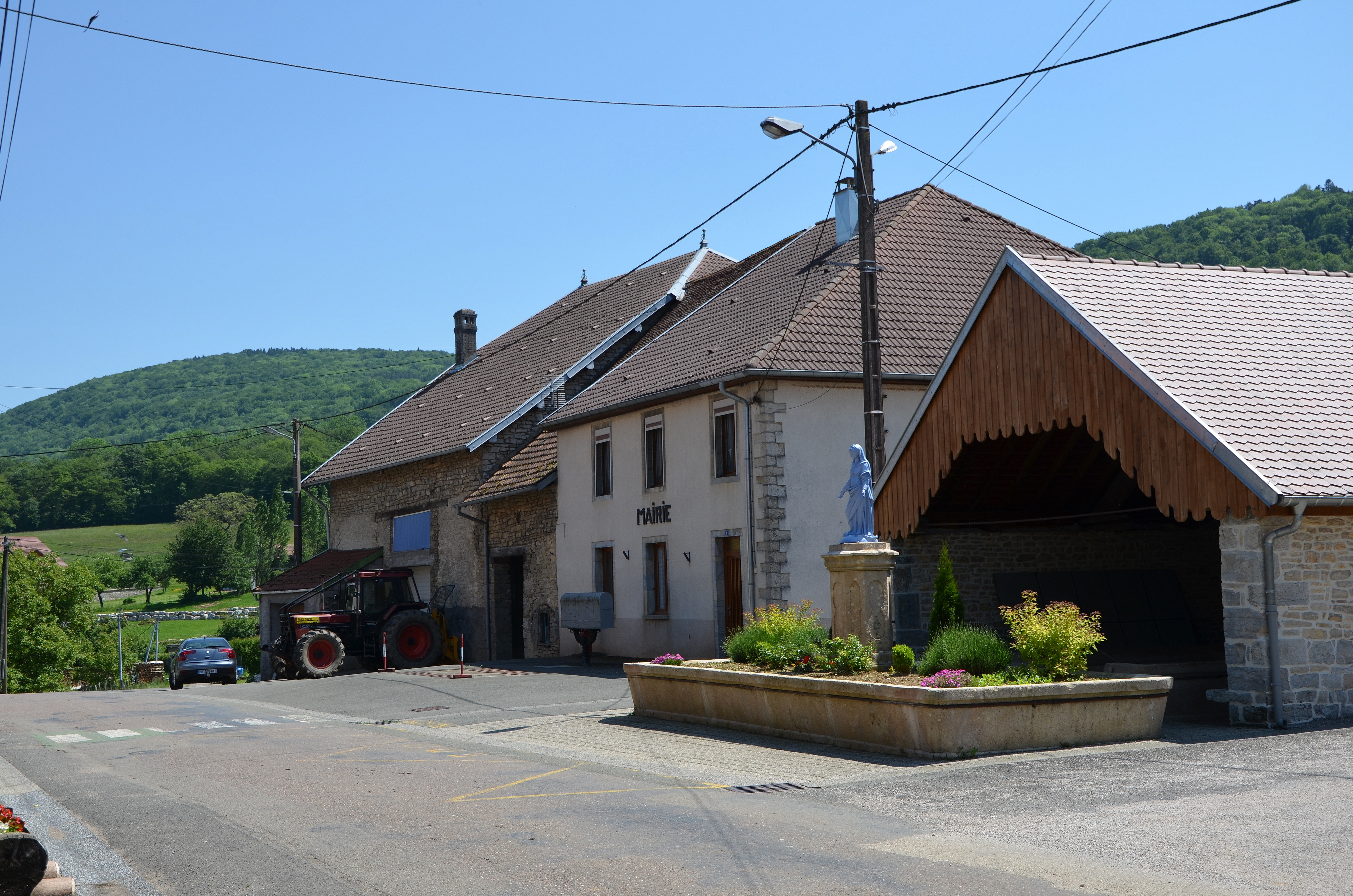 Mairie de Roche lès Clerval, Doubs, Franche-Comté, France